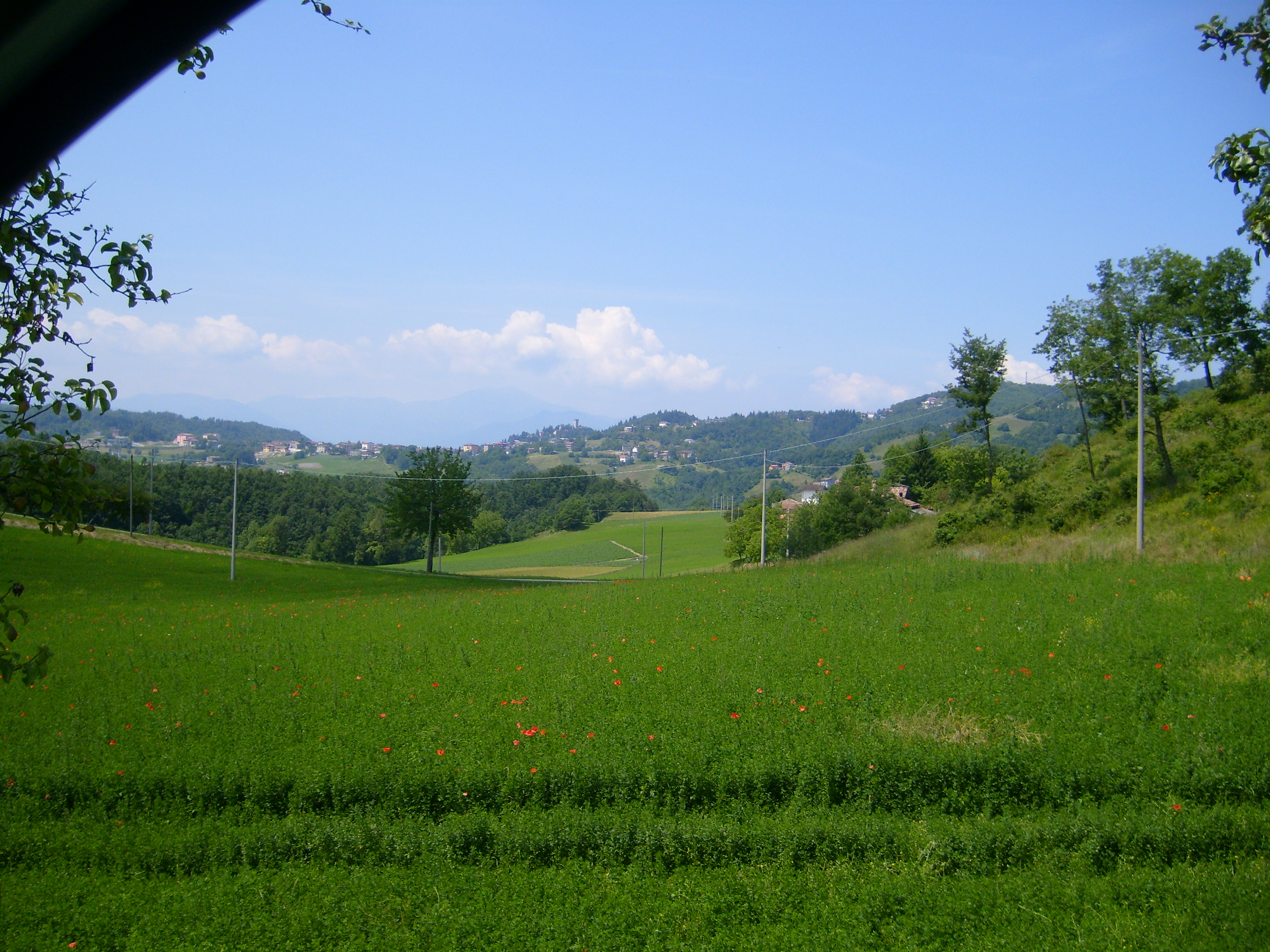 montese vista panoramica, e nello sfondo il monte cimone